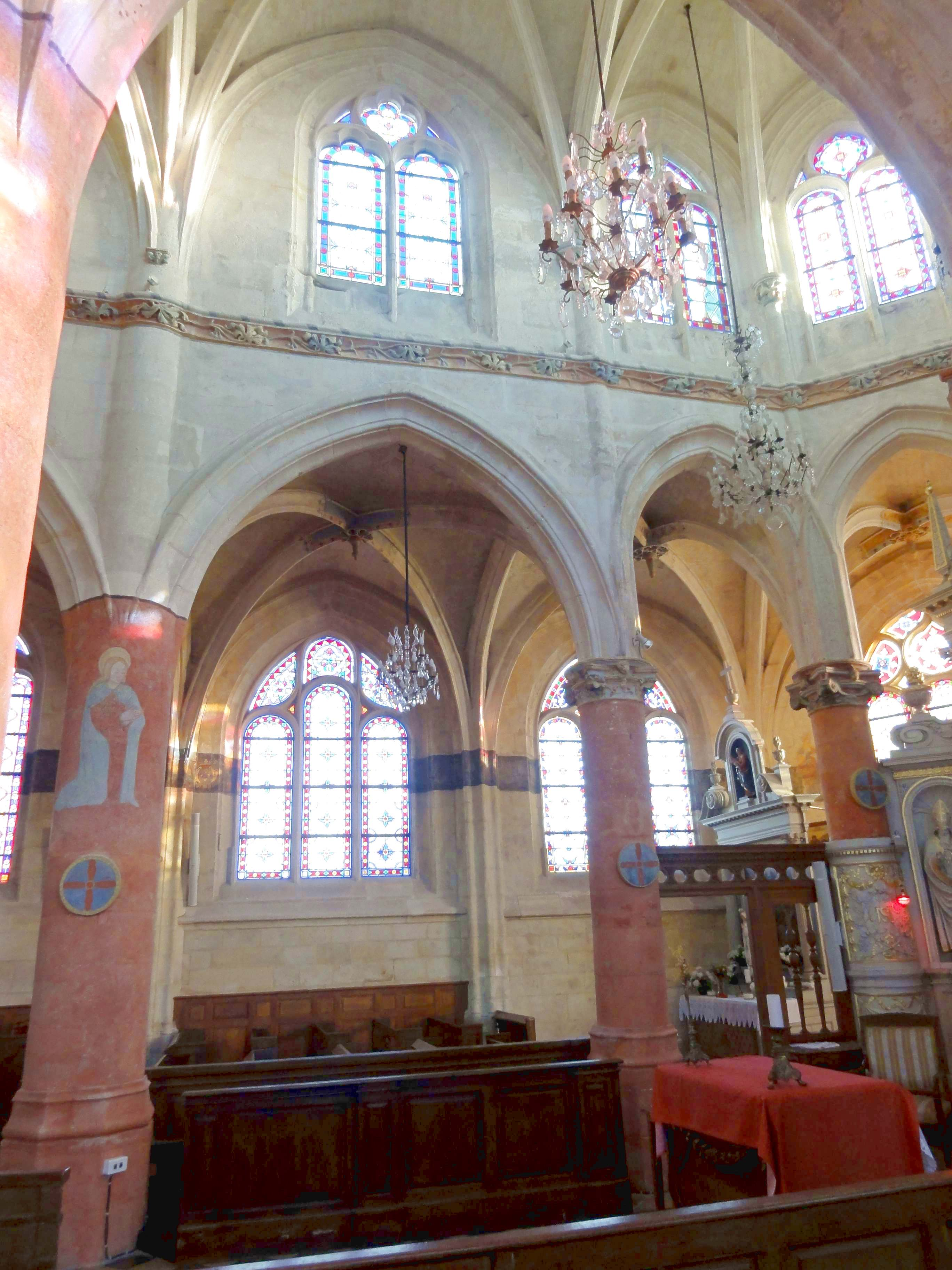 Intérieur de l'église - voir titre.